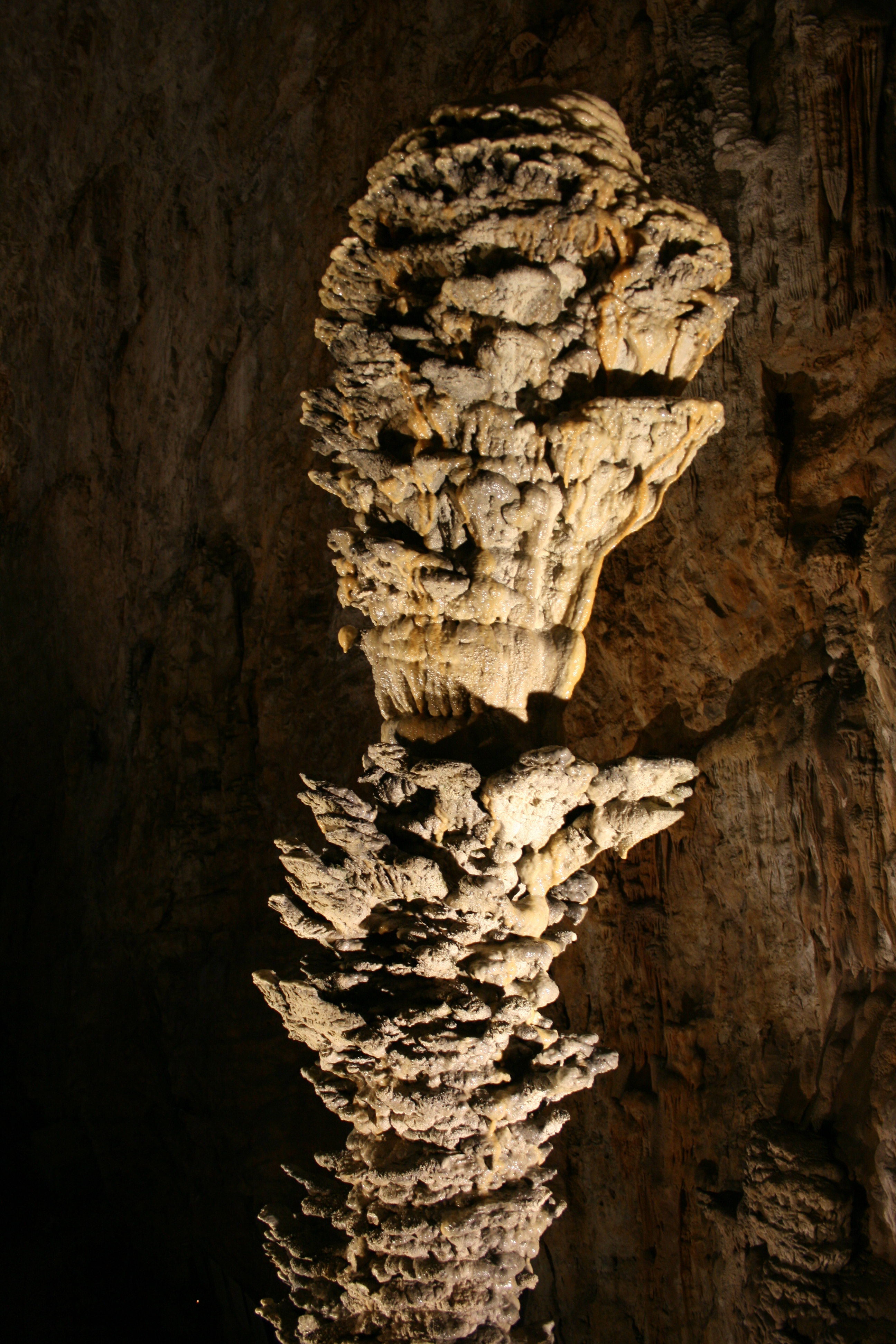 Une stalagmite dans la Grotta Gigante, non loin de Trieste, en Italie.